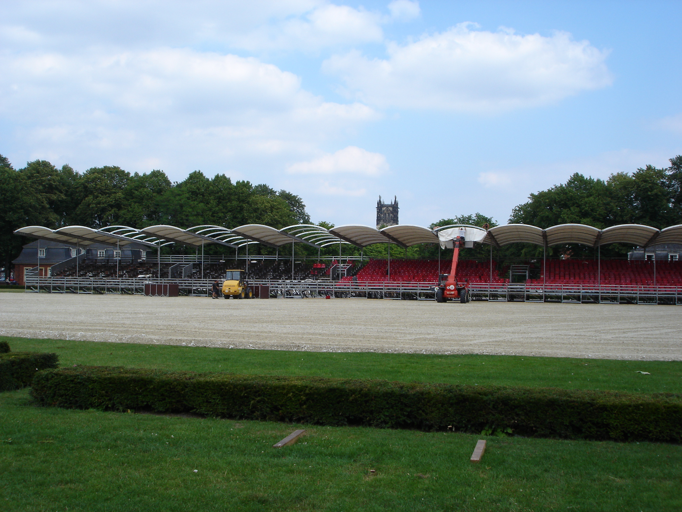 Vorbereitungen zum Turnier der Sieger auf dem Schlossplatz in Münster, Westfalen, Germany. Im Hintergrund der Turm der Überwasserkirche.